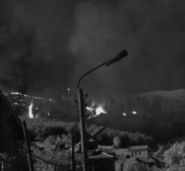 Действащ пожар в горските площи до населено място в България.